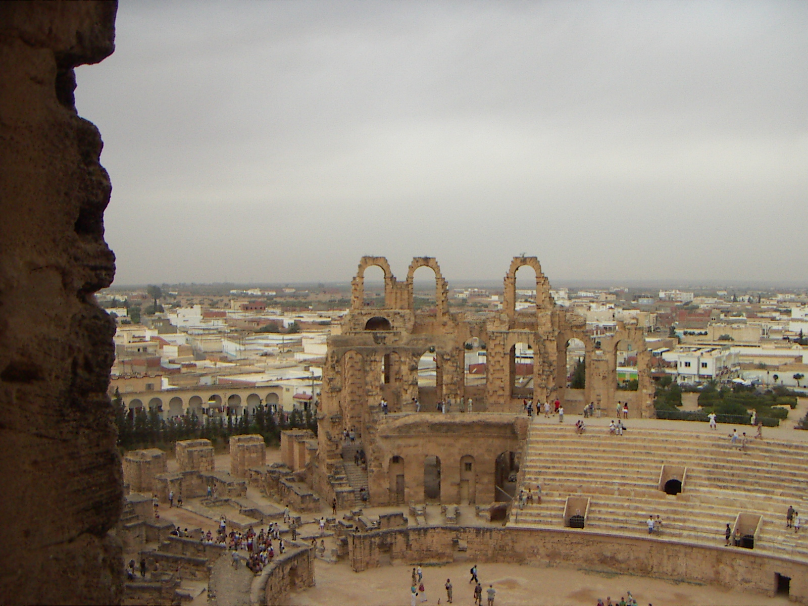 El Djem, Septembre 2007